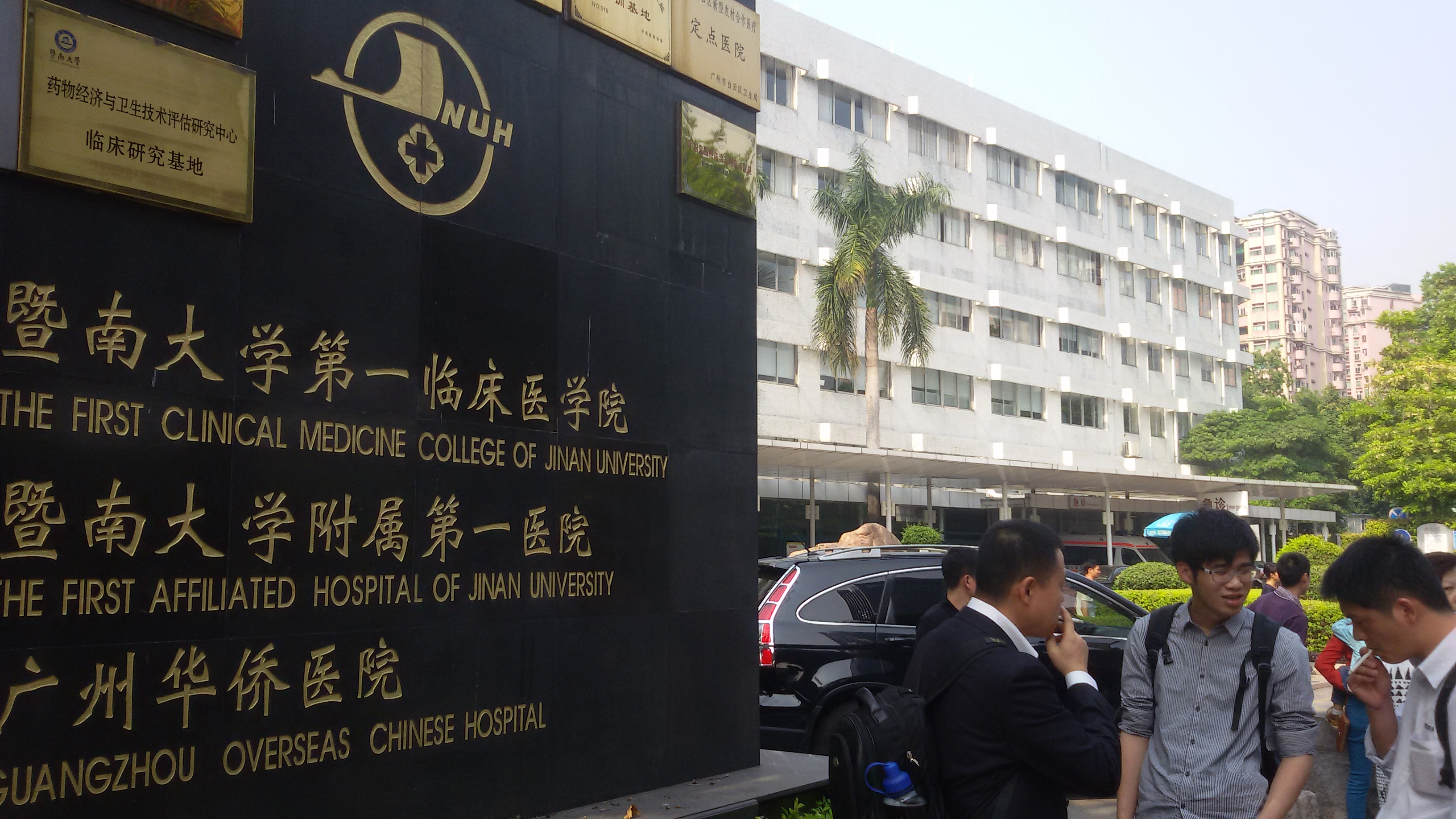 粵語: 广州华侨医院